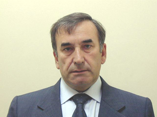 Luis Abelardo Patti.